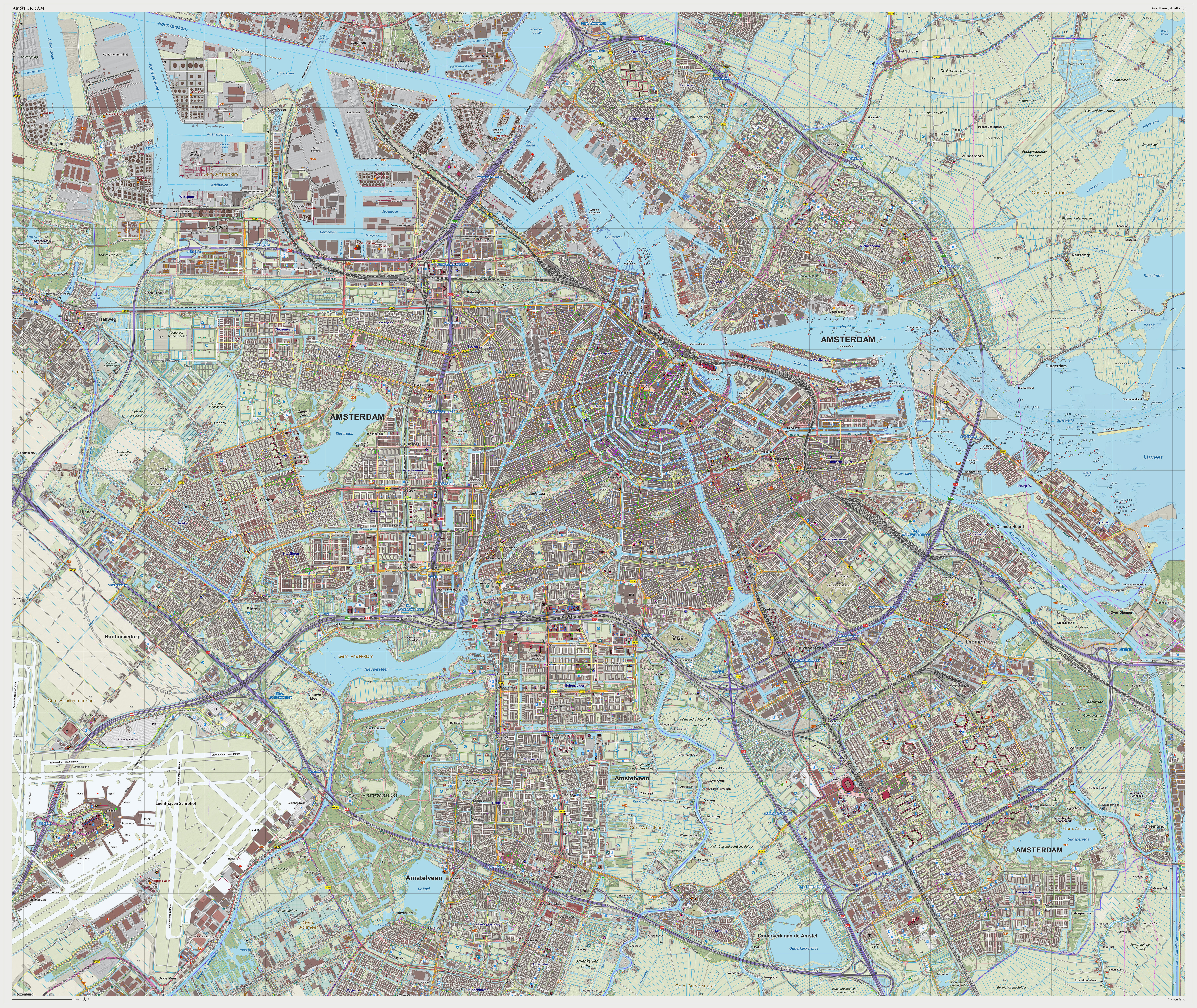 Topografische kaart van Amsterdam (woonplaats). Resolutie: 300 pixels/km. Kaartbeeld samengesteld uit de open geodata van de Top10NL en Top25namen (Basisregistratie Topografie, Kadaster), Creative Commons BY licentie. Gebouwvlakken uit open geodata BAG extract. Wegen uit de OpenStreetMap. Reliëfschaduw uit de Actuele Hoogtekaart AHN2. Samenstelling en kleurenschema: Jan-Willem van Aalst, met QGIS2. Zie ook de Legenda.